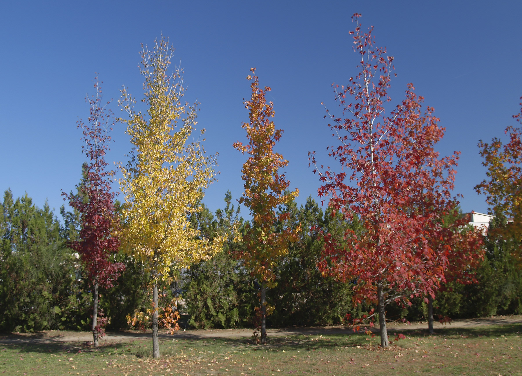 Liquidambar styraciflua. Parque Ana Tutor, Madrid, España. 28-octubre-2007.